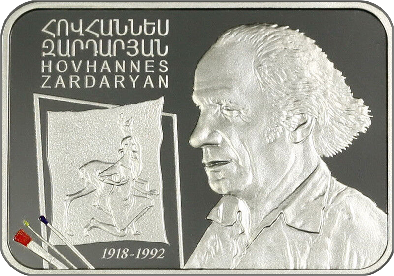 Հայաստանի Հանրապետության հուշադրամ «Հովհաննես Զարդարյան-100», 2018 թ․, 100 դրամ, արծաթ-925